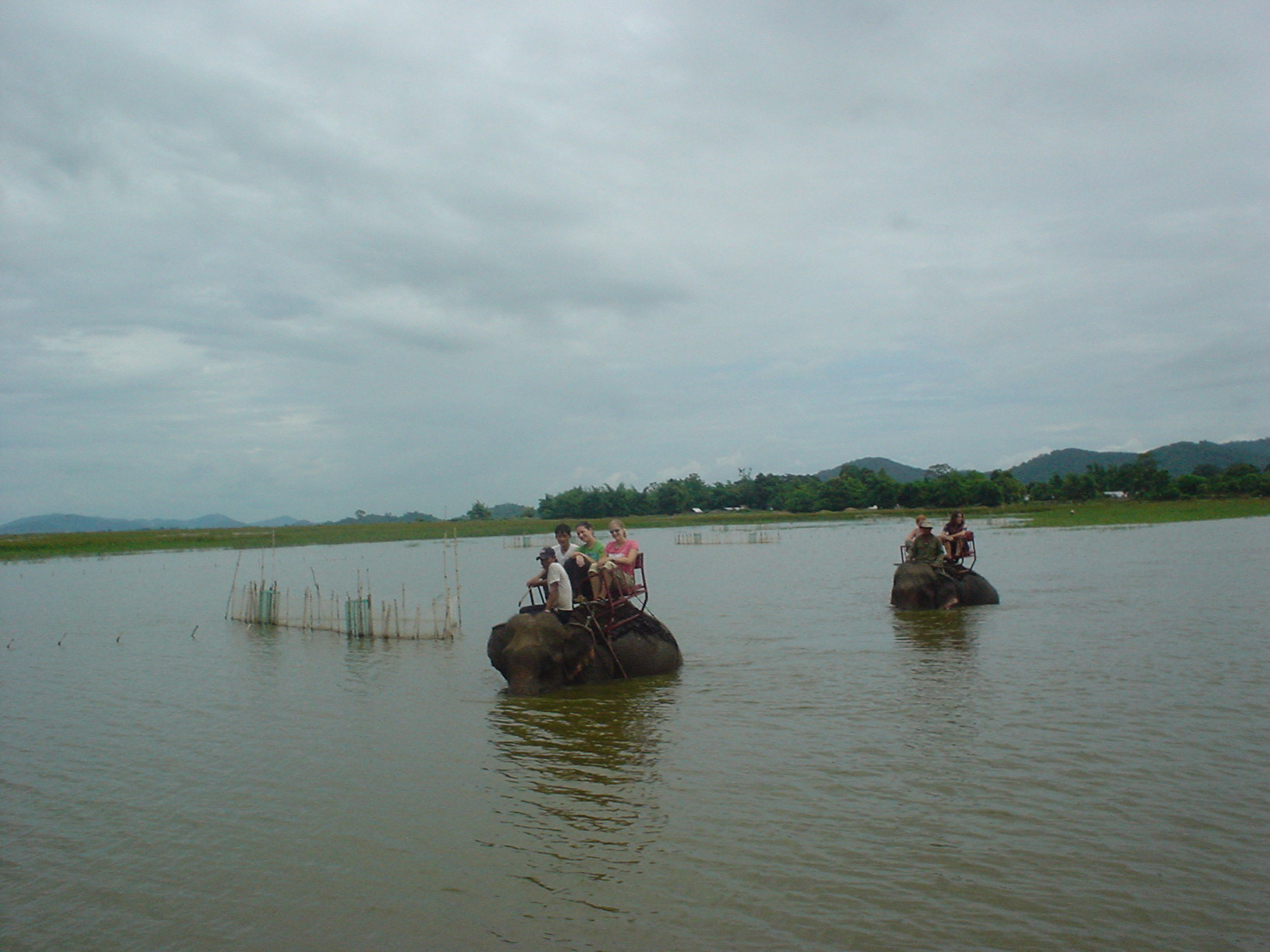 Voi chở du khách đi tham quan Hồ Lắk -Đắk lắk -Tây Nguyên